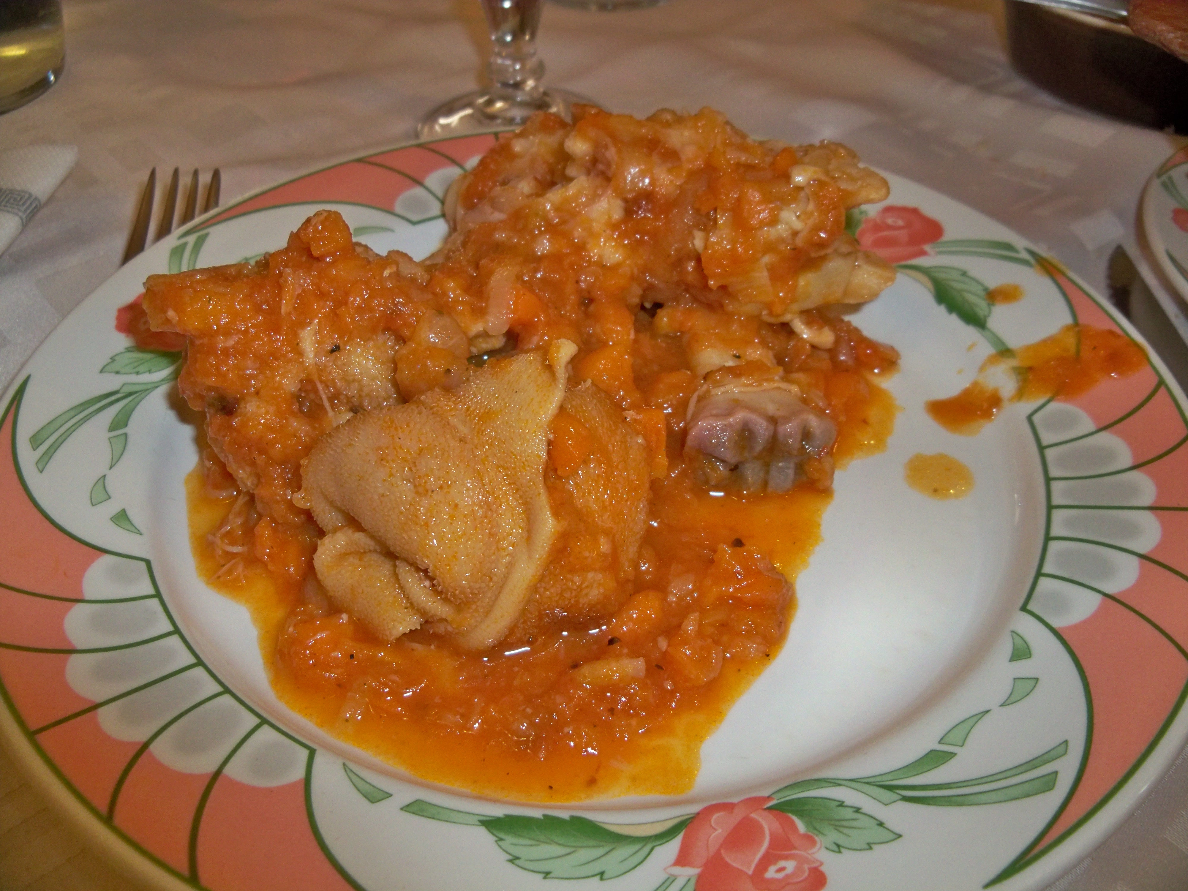 Pieds et Paquets, spécialité de Sisteron (04)